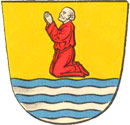 Altes Wappen der Ortsgemeinde Badenheim Zeichner: unbekannt Datum: um 1608